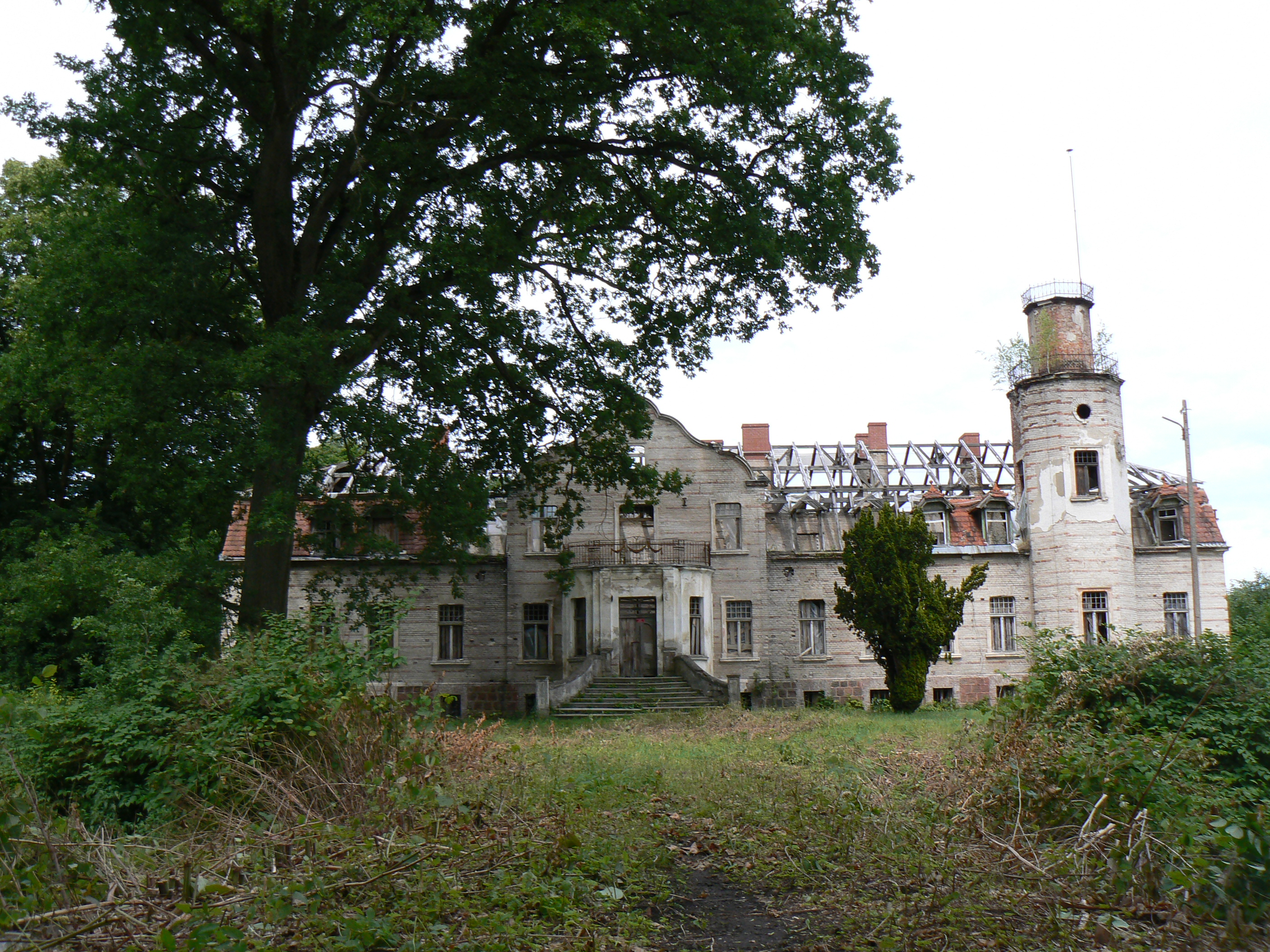 Słowieńsko, dwór, 1910